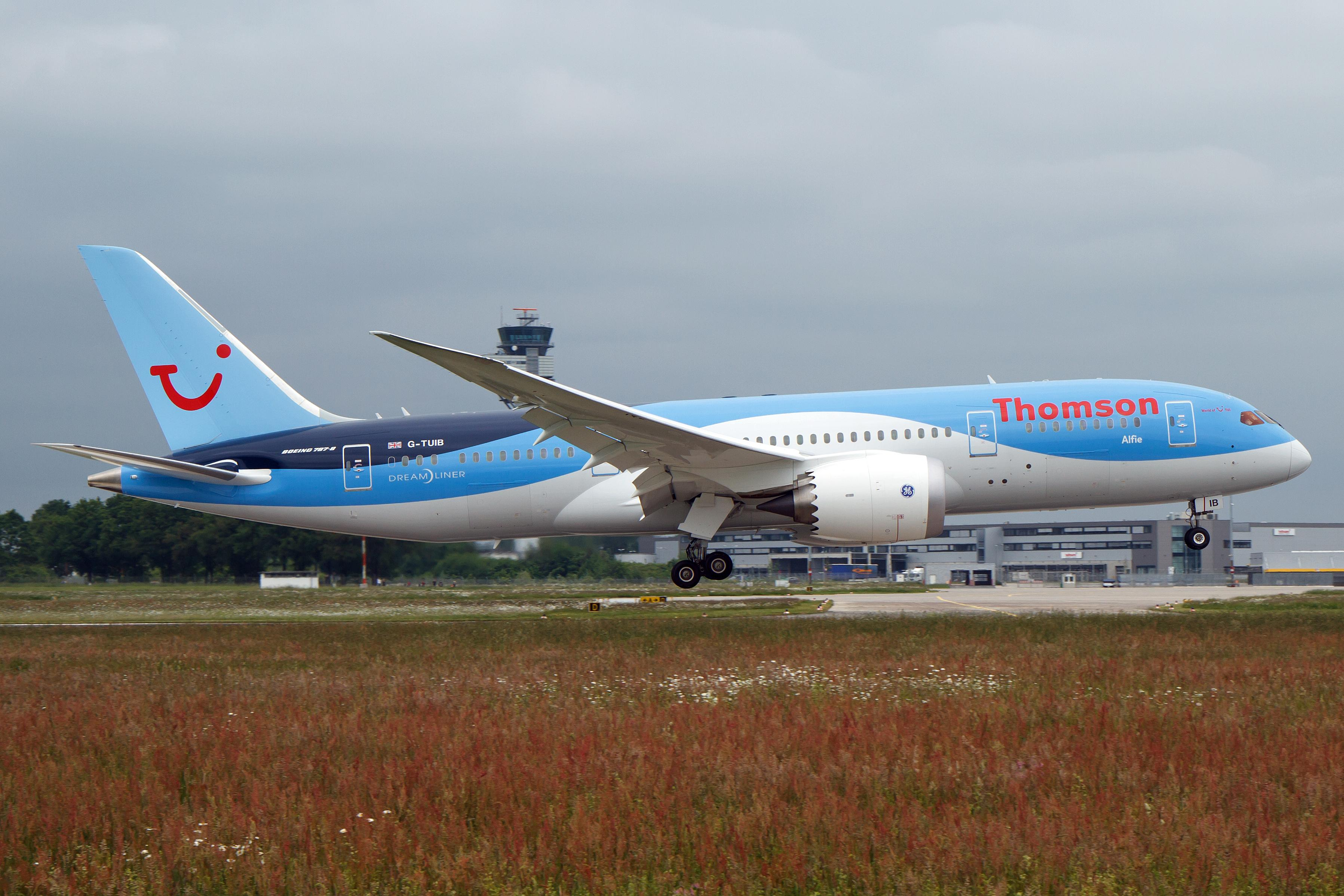 HAJ/EDDV 09-06-13